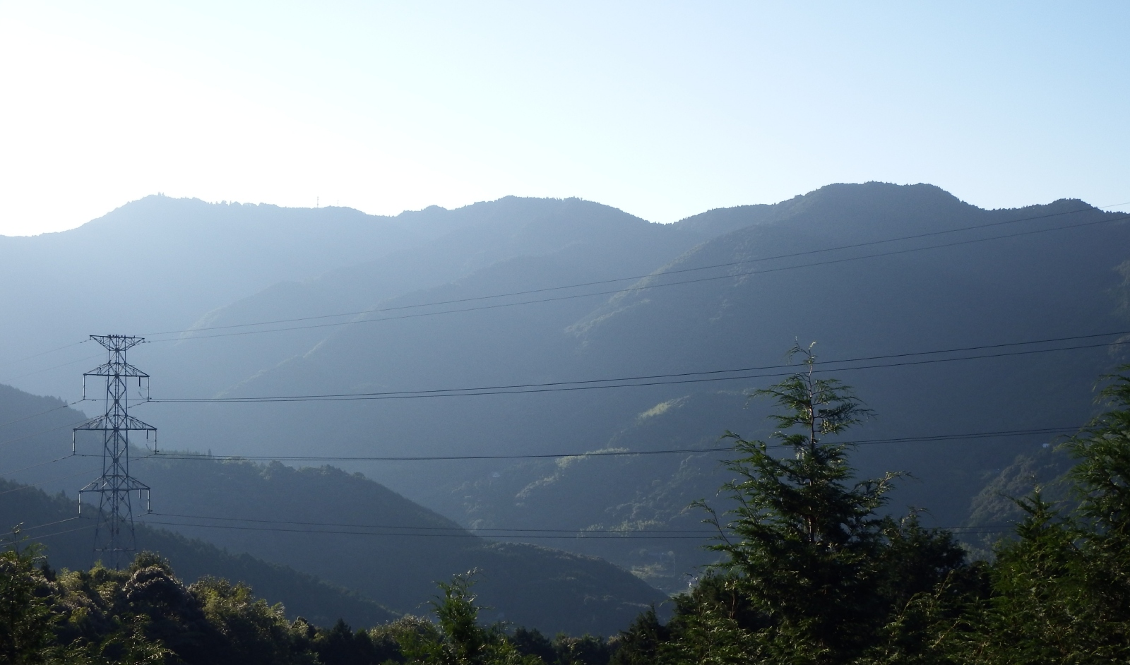 出石山の全景